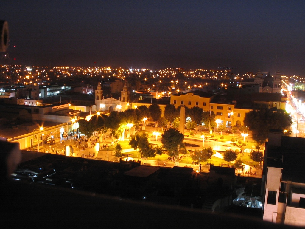 Foto nocturna de la Plaza de Armas de la ciudad de Ica, Perú, tomada desde el edificio más alto de la ciudad.